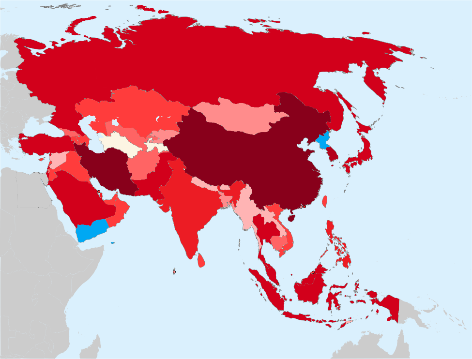 中文（台灣） (zh-tw): 亞洲各國COVID-19確診病例數(截至3月26日止) 0 1+ 10+ 50+ 100+ 500+ 1000+ 5000+ 10000+ 疑似 粵語 (yue): 亞洲各國武漢肺炎確診病例數(到3月26號止) 0 1+ 10+ 50+ 100+ 500+ 1000+ 5000+ 10000+ 疑似 資料來源:2019冠狀病毒病病例數